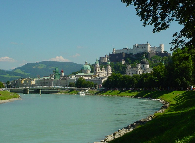 Salzburg, Stadtansicht über die Salzach